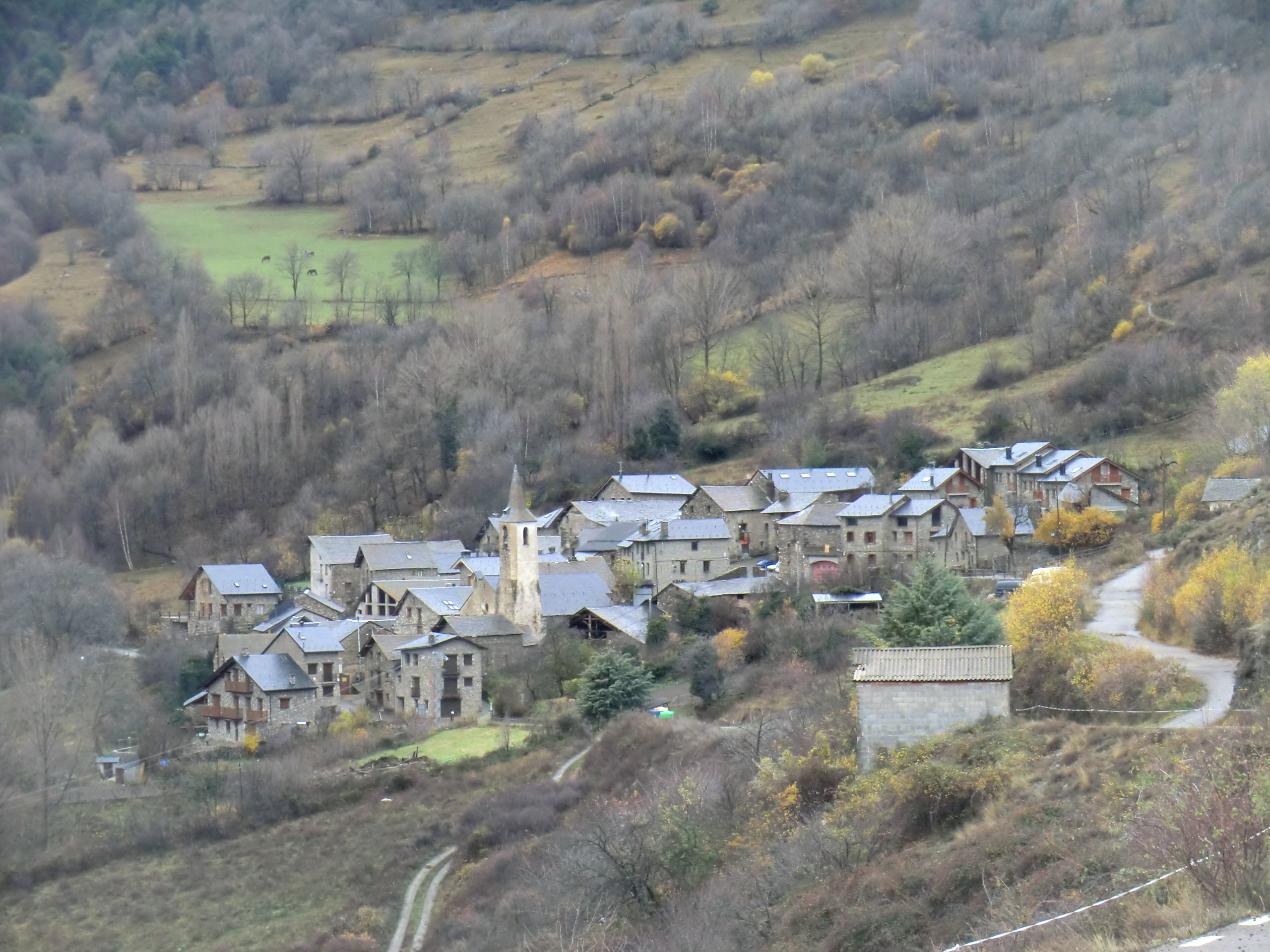 Vista de Jou des de la carretera de Son